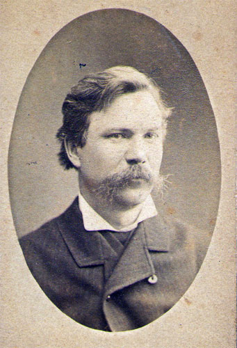 Іван Карпенко-Карий: Іван Тобілевич (Карпенко-Карий). 1883 р., Єлисаветград.